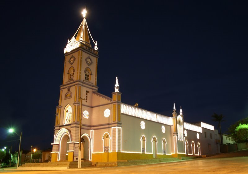 Igreja Matriz de Nossa Senhora da Conceição em Malta-PB